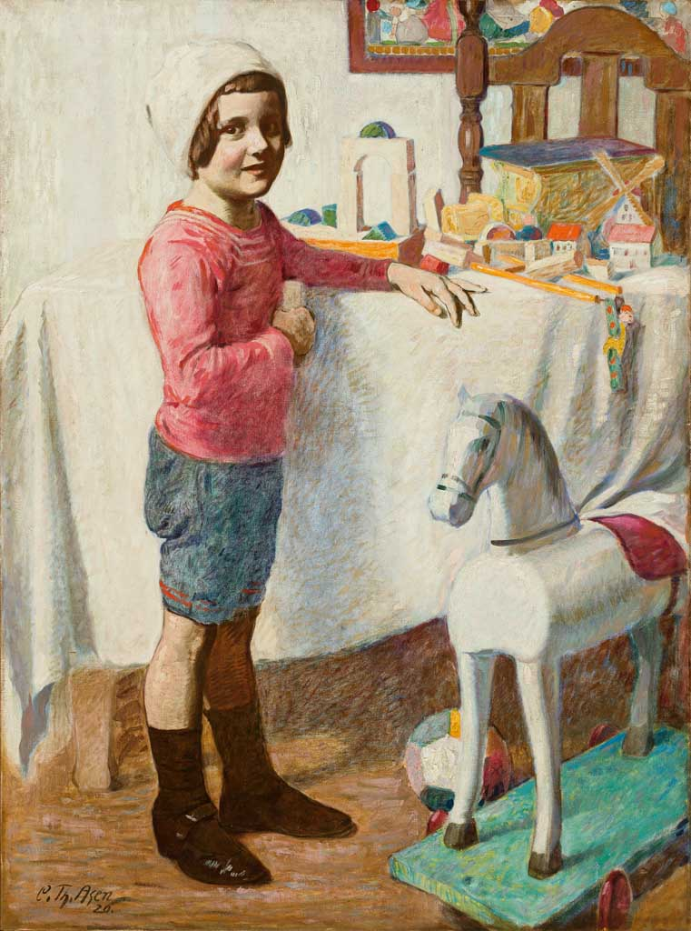 Portrait eines Knaben am Tisch mit Spielzeug, daneben ein Ziehpferd und Ball. Öl/Lwd. 125 x 94 cm. Signiert und datiert 1920.